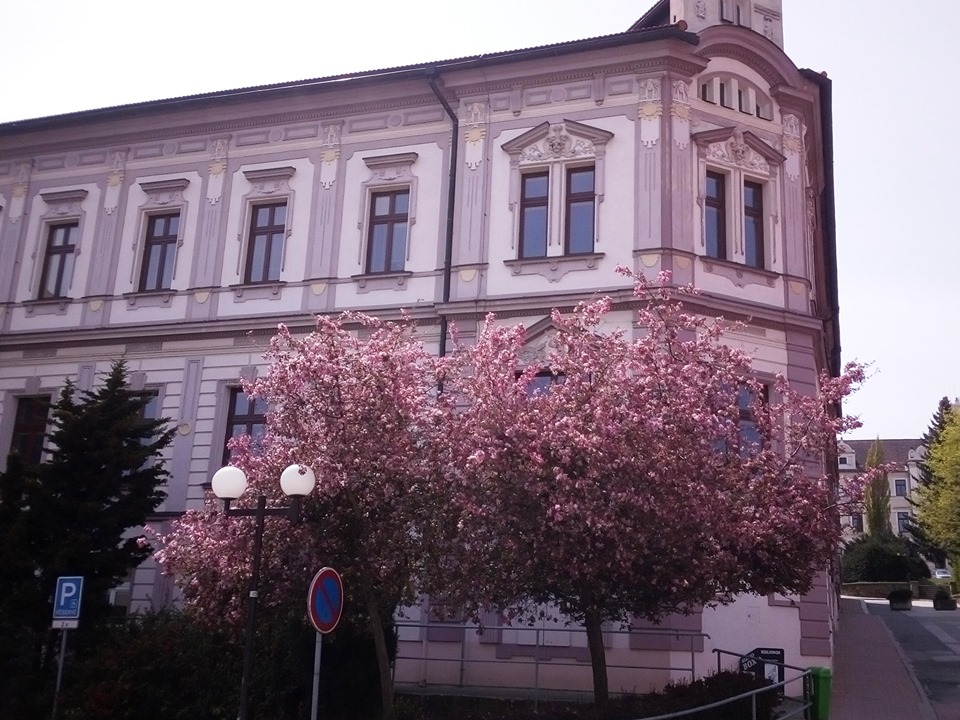 Městská knihovna Pelhřimov